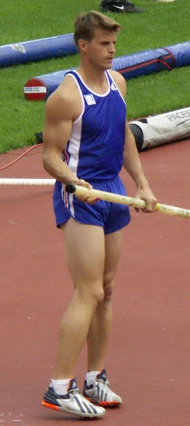 Jean Galfione aux Championnats du monde d'Helsinki en 2005.